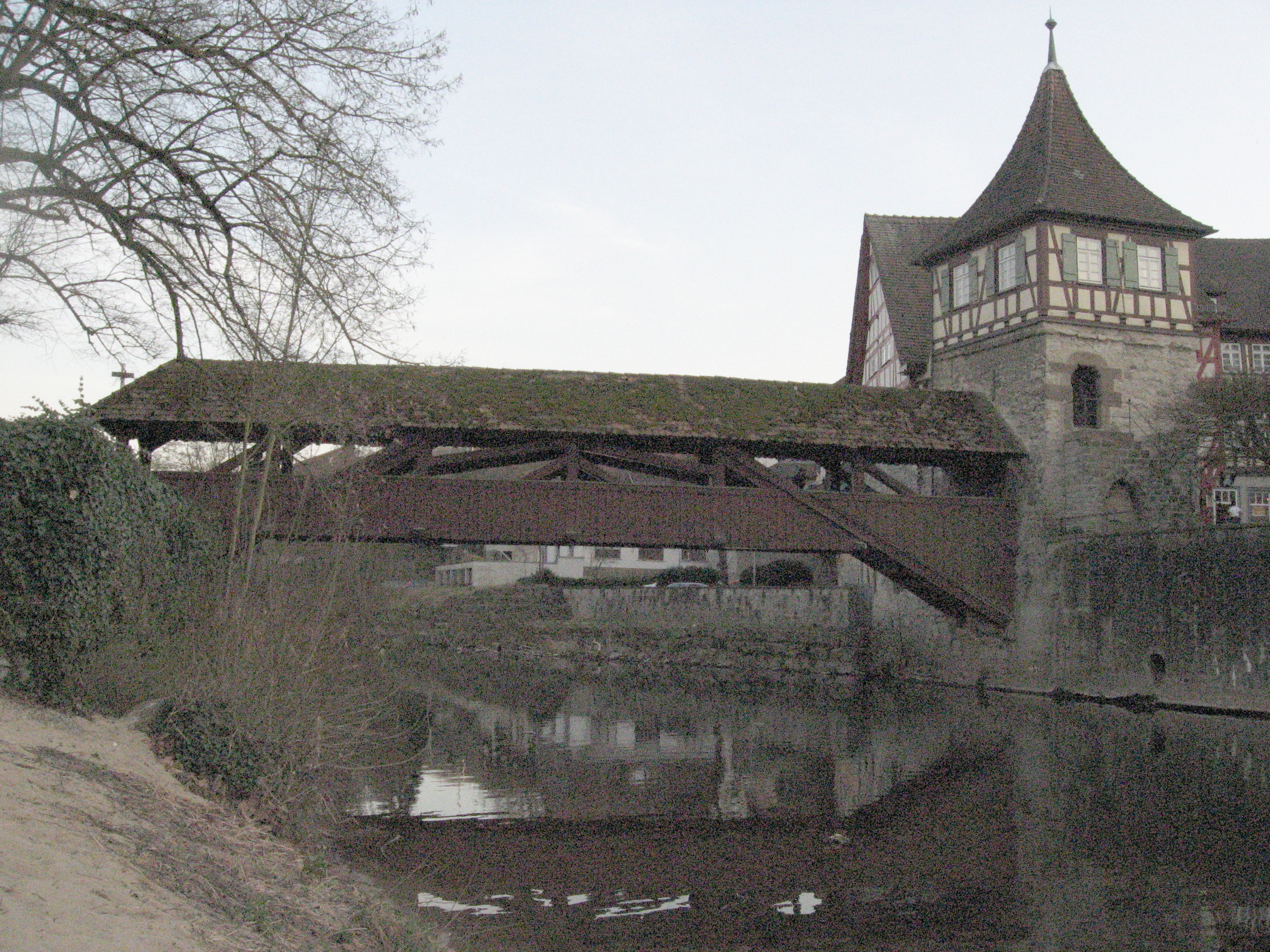 Blick von der Nordspitze des Unterwöhrds auf den Roten Steg mit Turm in Schwäbisch Hall